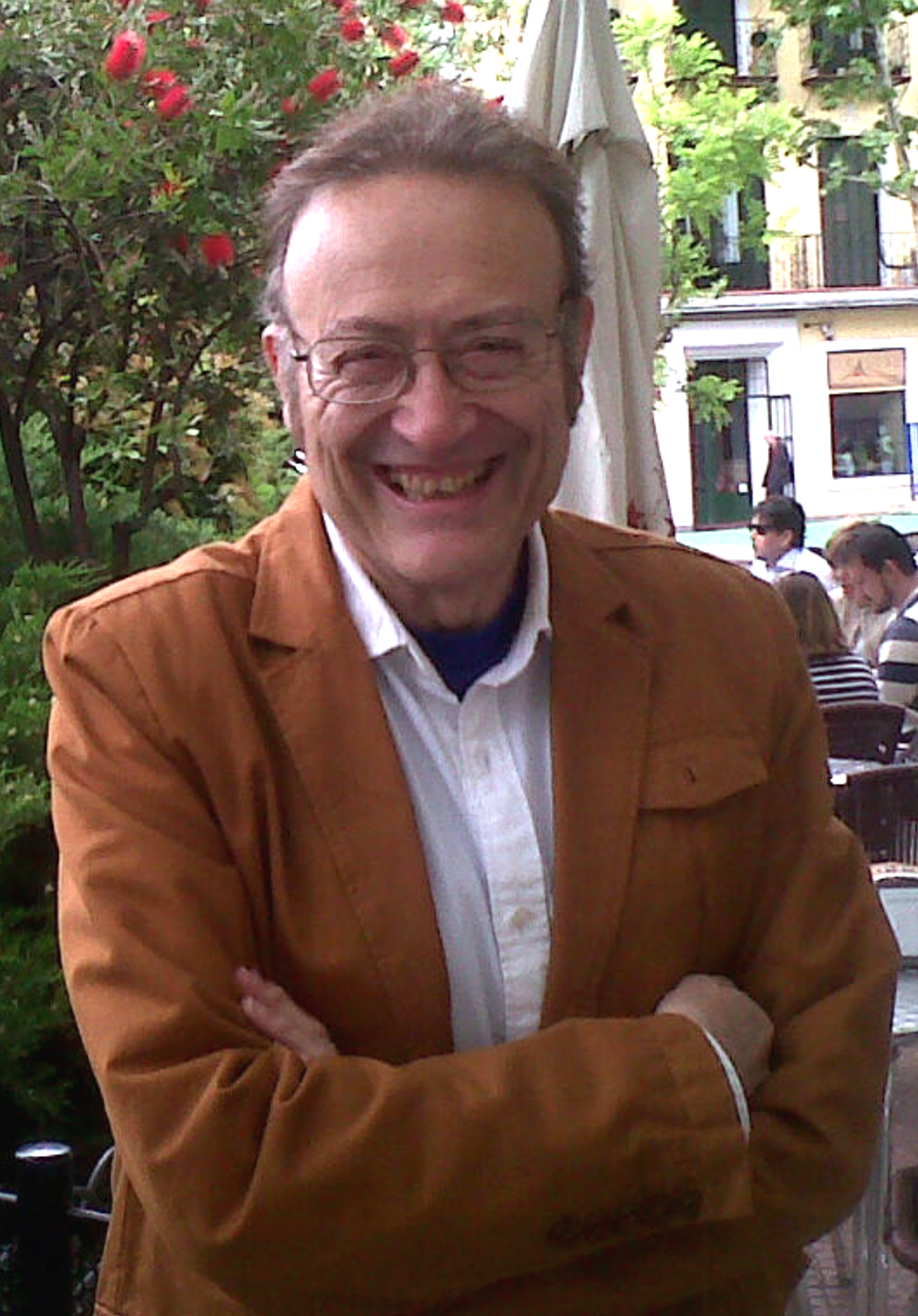 Gregorio Morales Villena en mayo de 2015